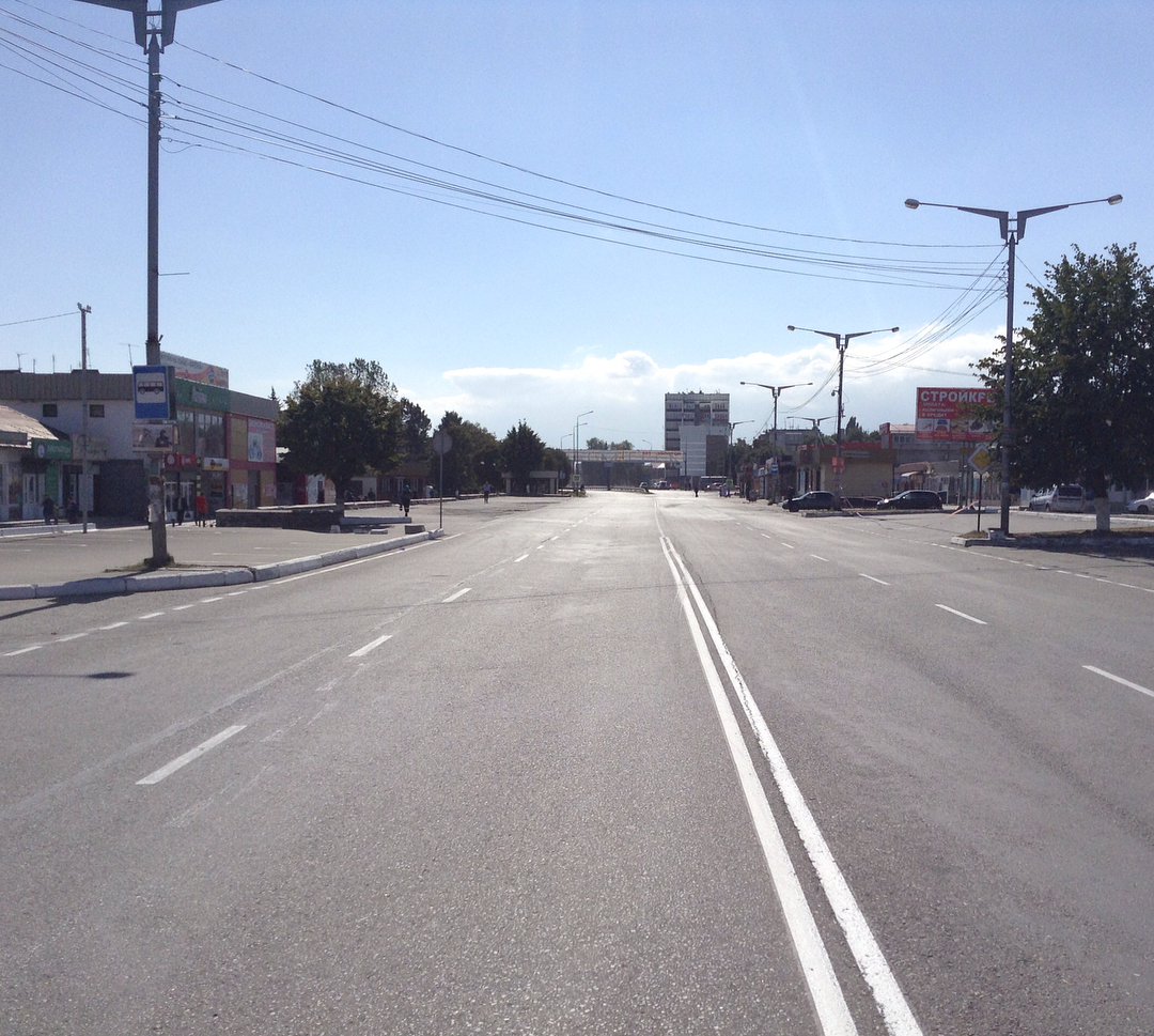 Район Кооператор в городе Баксан